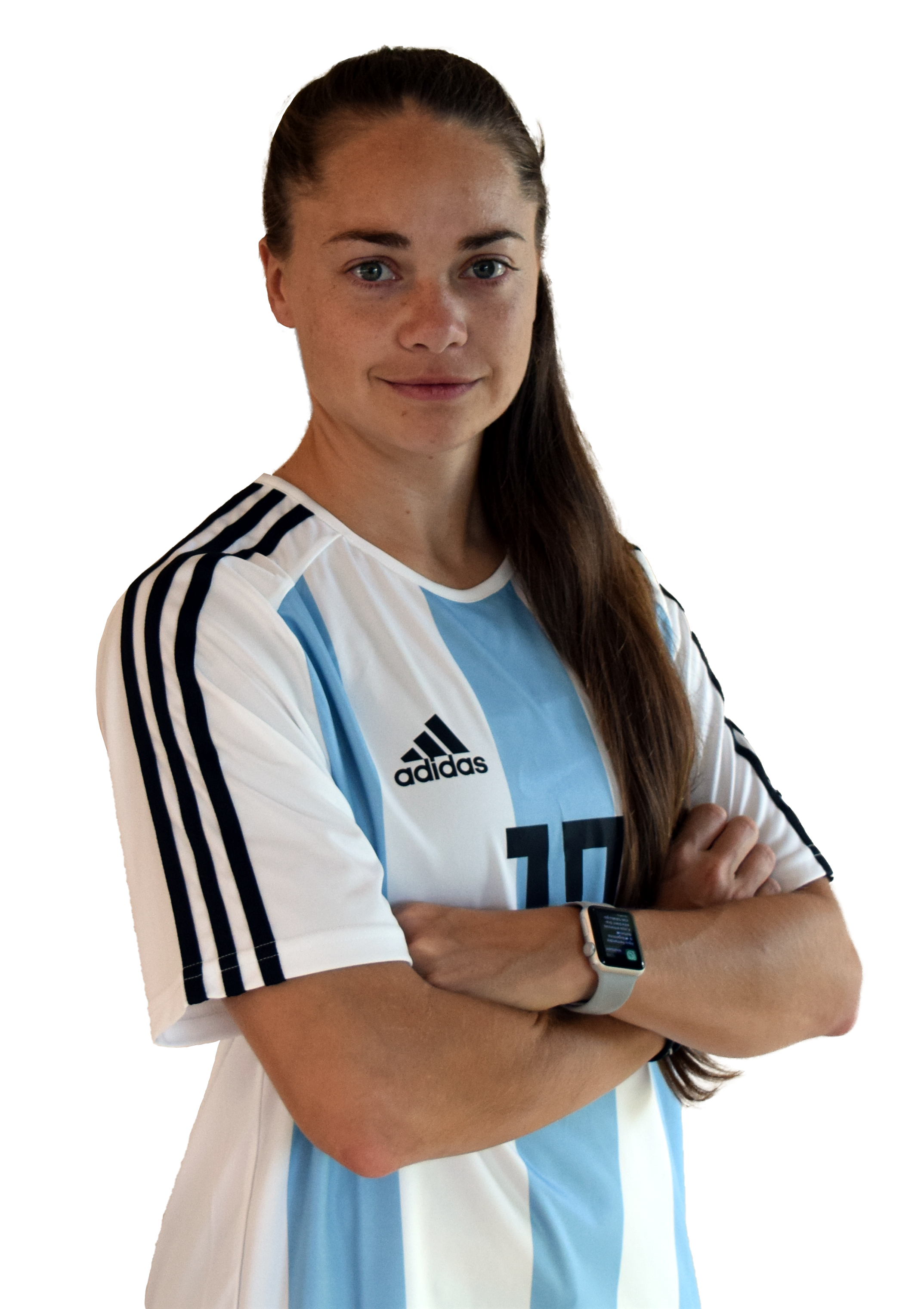 Estefanía Banini, jugadora de la selección mayor femenina de fútbol de Argentina.Foto sacada previo al primer partido del repechaje por un lugar para el mundial de futbol femenino de Francia 2019